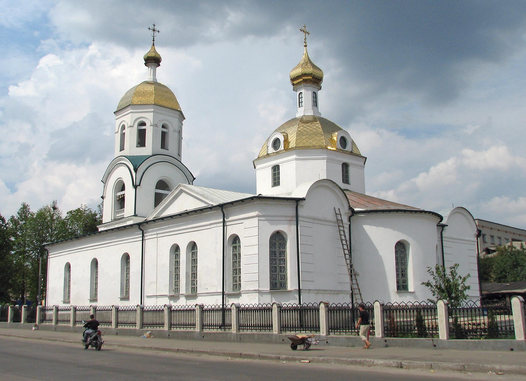 Orthodox church in Uman, Ukraine, Николаевский собор, памятник архитектуры ХІХ в. Построен на пожертвования горожан в честь победы над Наполеоном в 1812 году (Адрес: ул. Советская, 39).